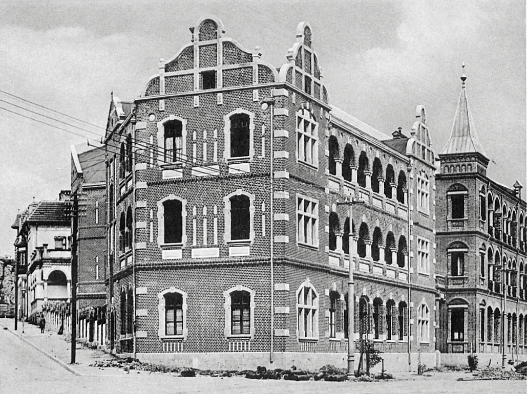 青岛广西路祥福洋行公寓二号楼